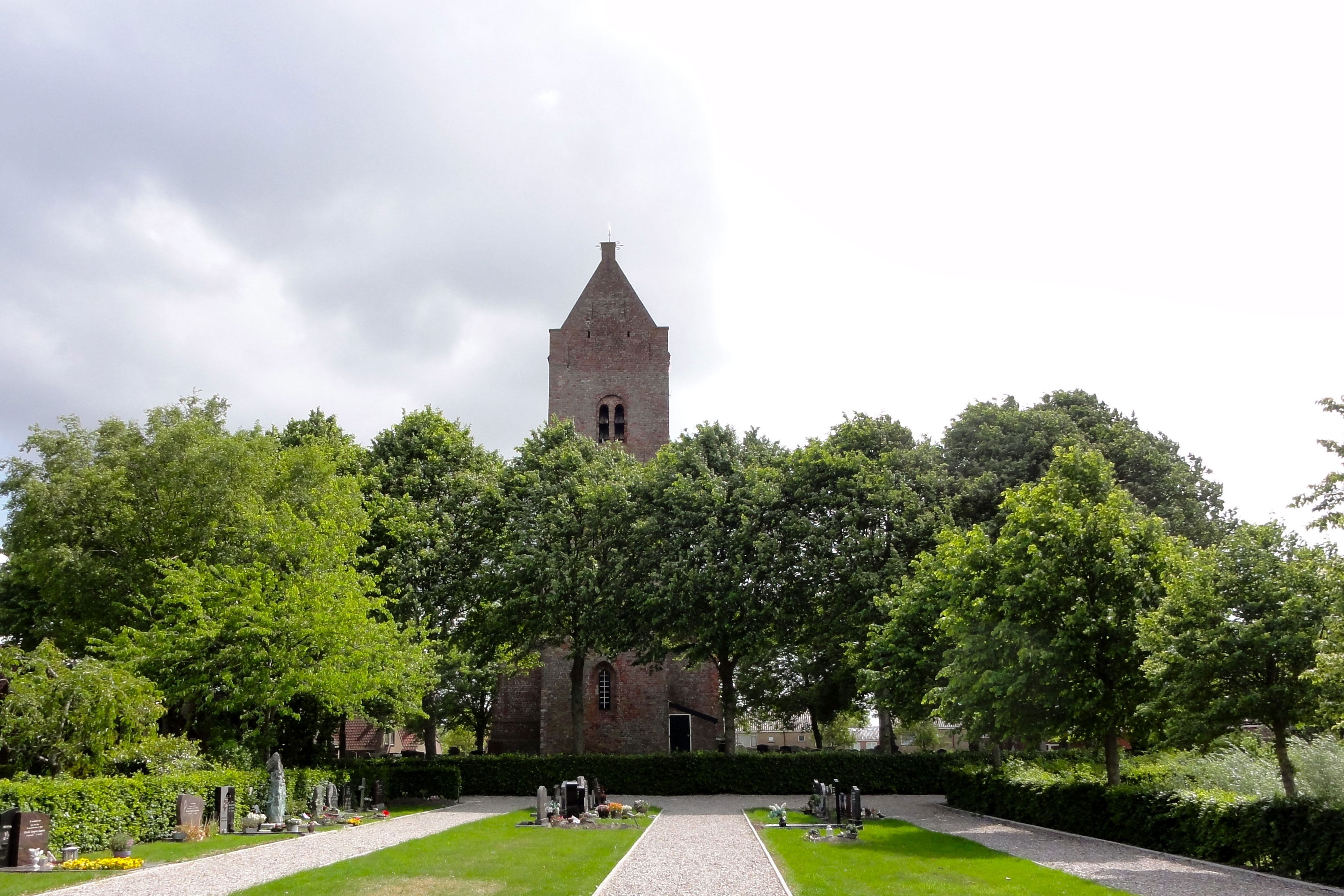 Sint-Nicolaaskerk van Blije